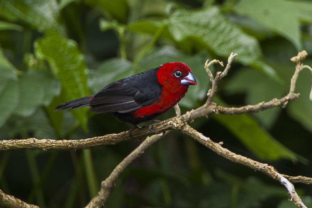 Red-headed Bluebill - Kakamega - Kenya 06_2643